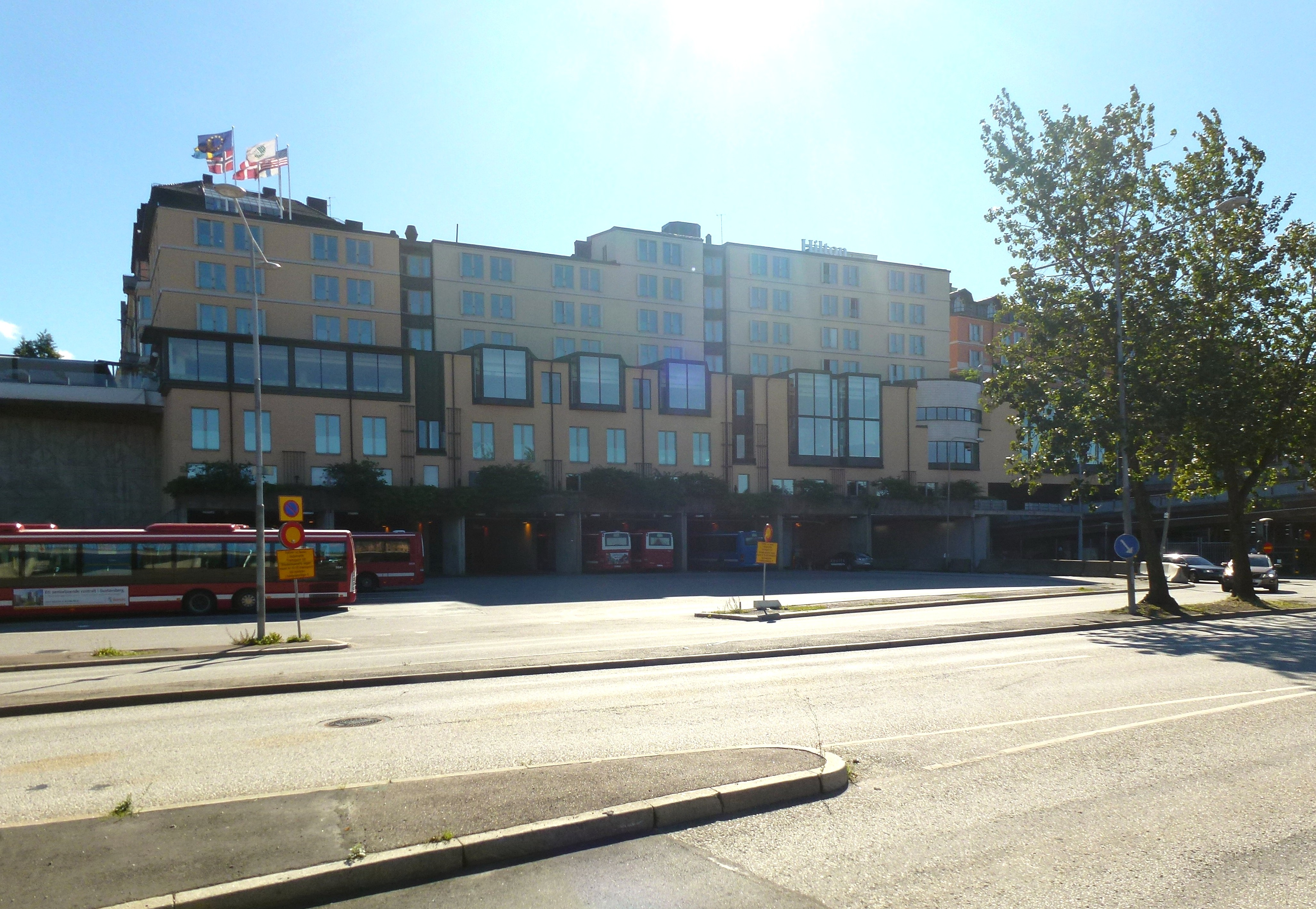 Gullfjärdsplan från Söder Mälarstrand